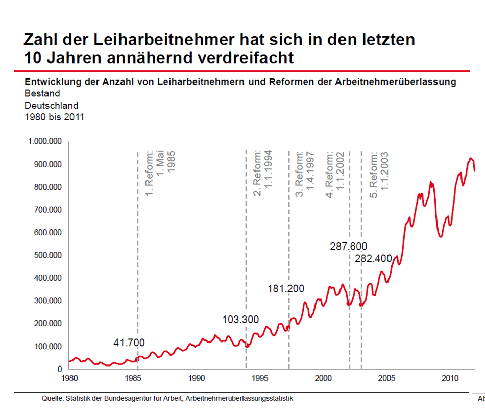 Diese Statistik ist der Öffentlichkeit als Gemeineigentum zugänglich gemacht worden. (siehe Lizenz...) So, wie man keine spezielle Extra-Lizenz benötigt, um eine vom Staat gebaute Straße zu betreten, braucht man auch keine Lizenzen, um veröffentlichte staatliche Statistiken zu verbreiten. Ich hoffe, das ist klar. Bürokratieverrückte toben sich bitte woanders aus, aber bitte nicht an sinnvoller Arbeit, danke.